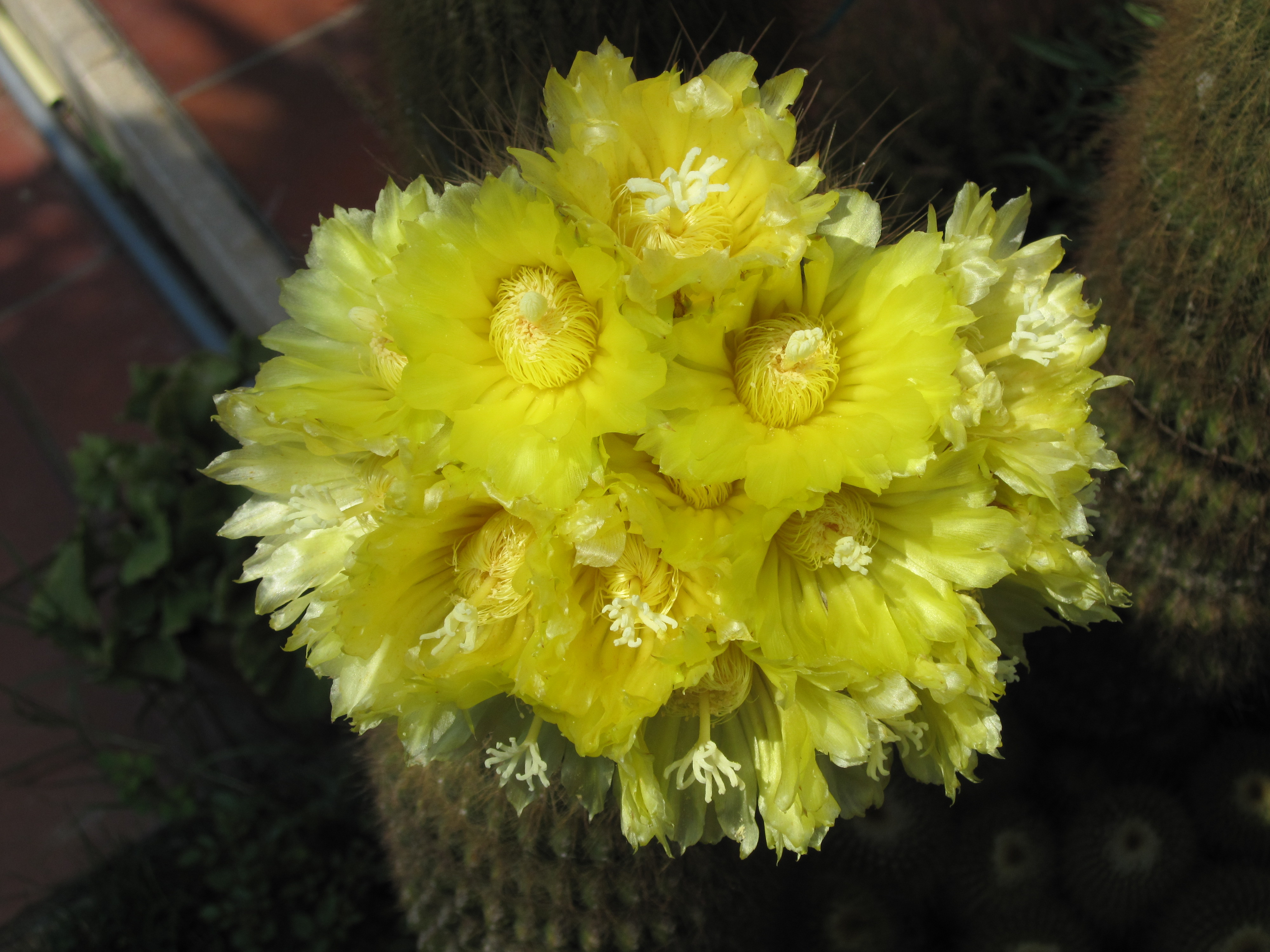 Parodia leninghausii: i fiori पाली pālī: Parodia leninghausii: flowers